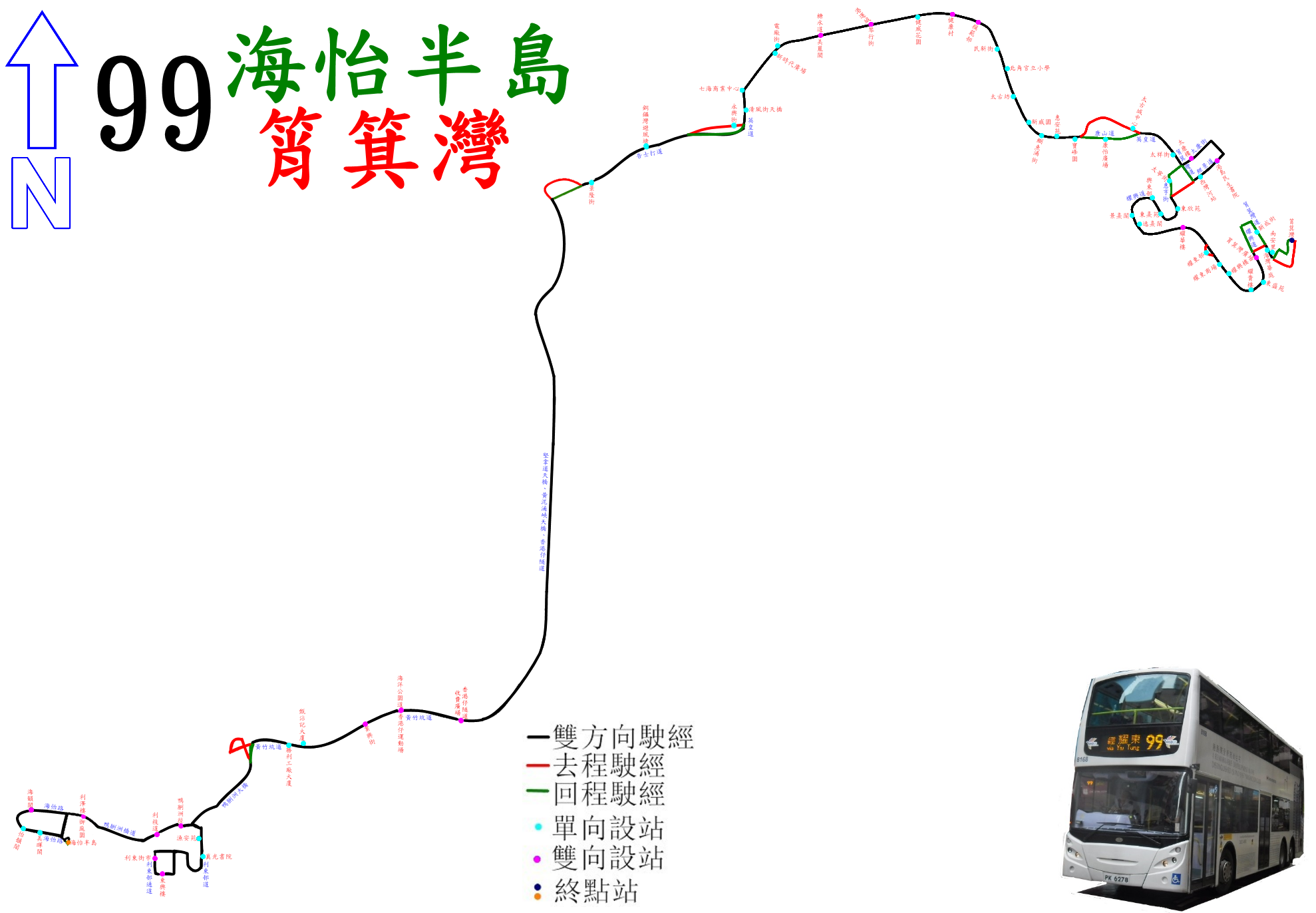 中文（香港）: 城巴99路公車的走線圖